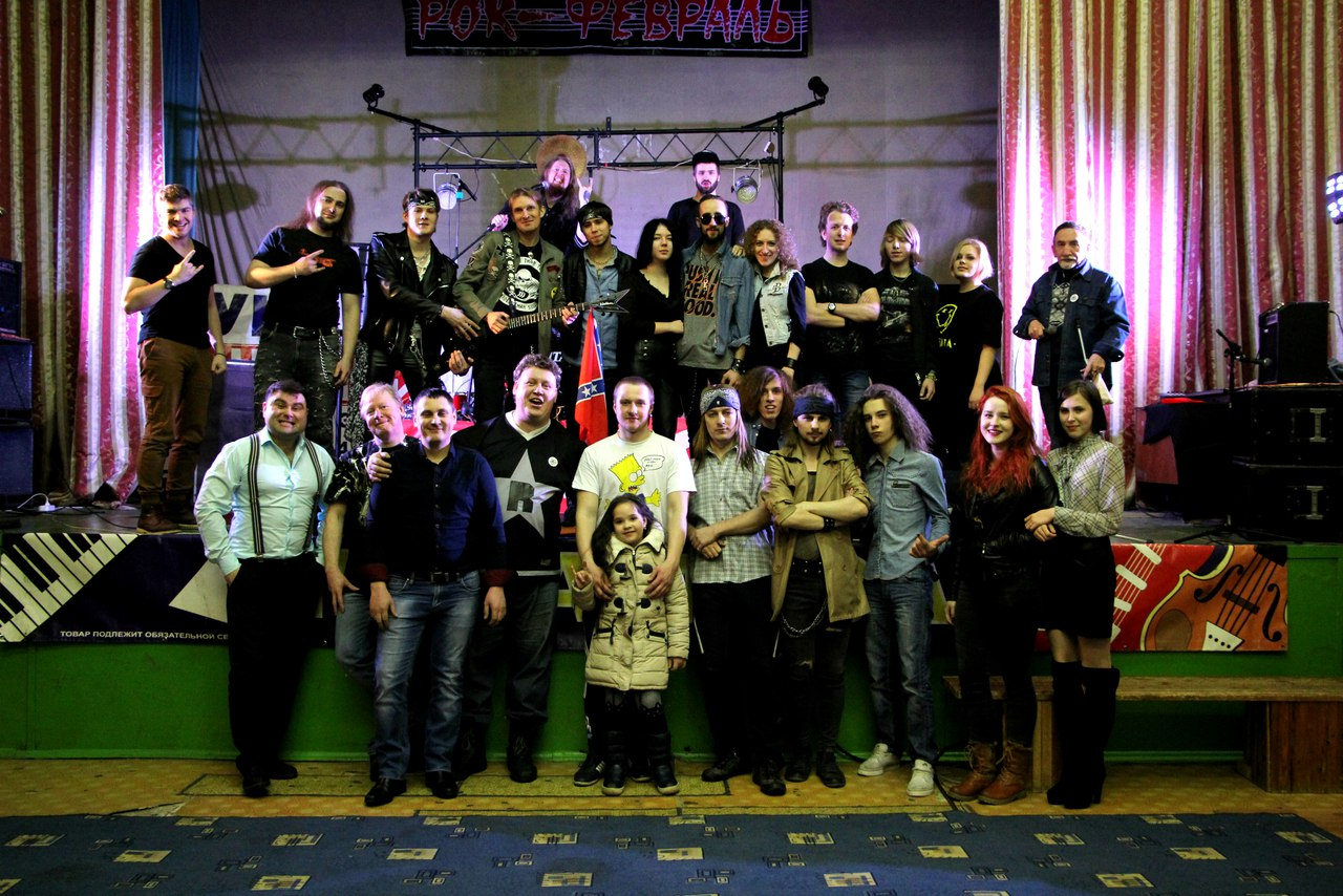 Музыканты основных команд, принимавших участие в фестивале "Рок-Февраль 2017".